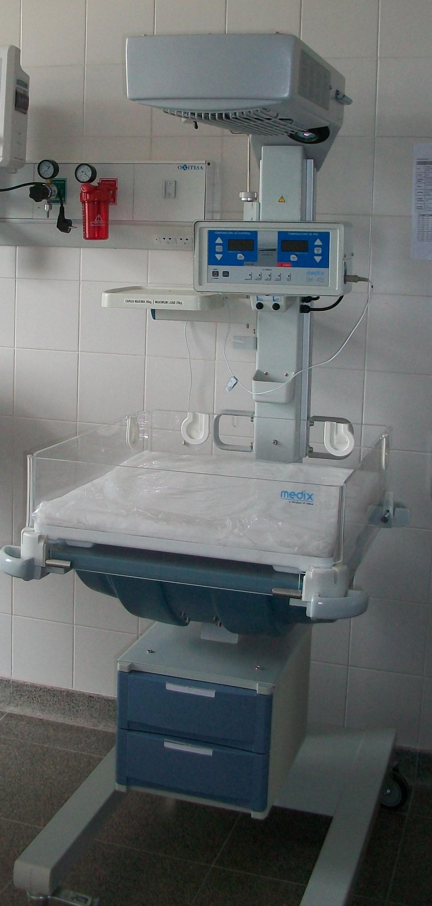 Foto tomada a una cuna radiante perteneciente al Htal Papa Francisco de Salta Argentina